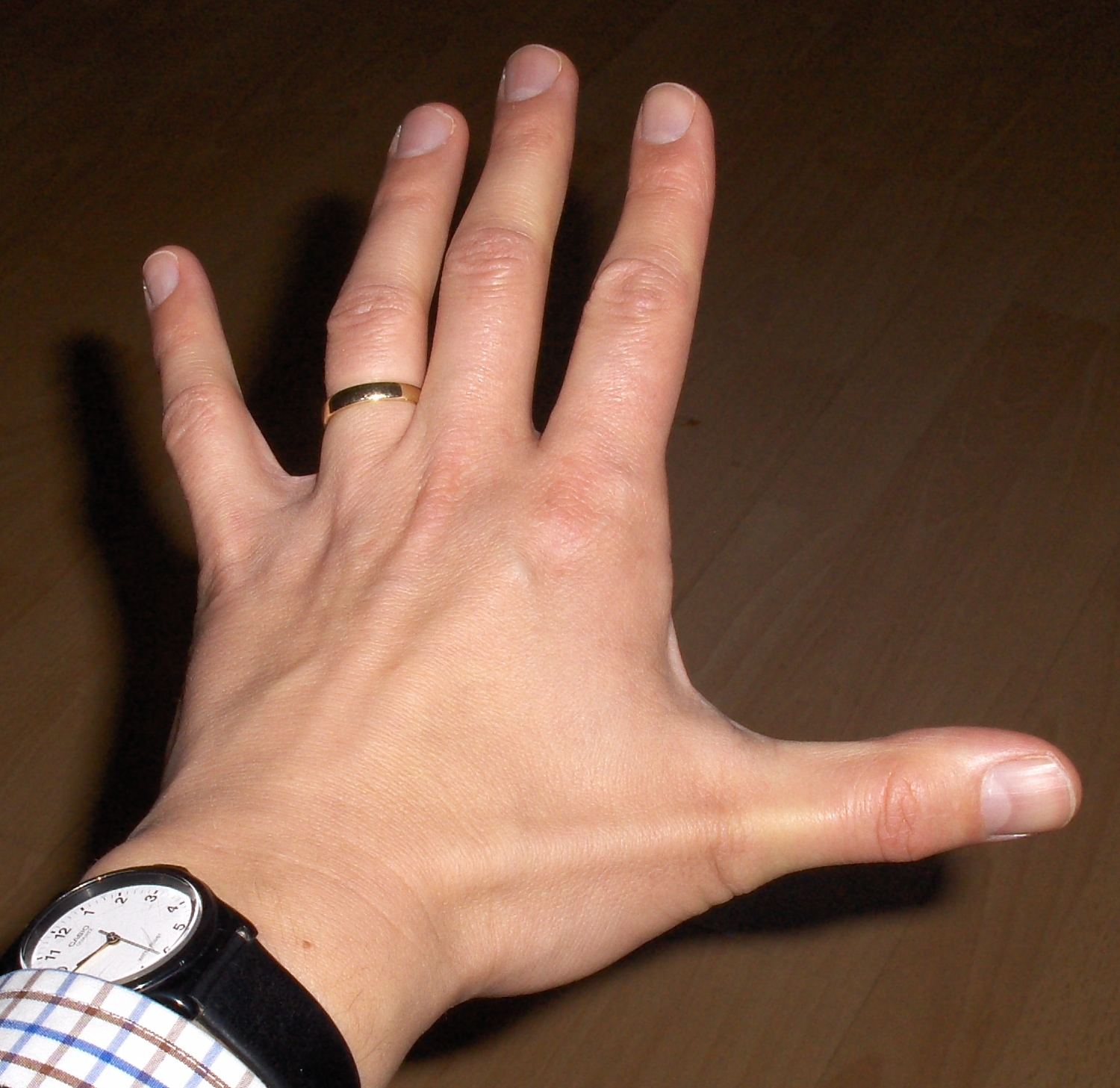 Linke Hand